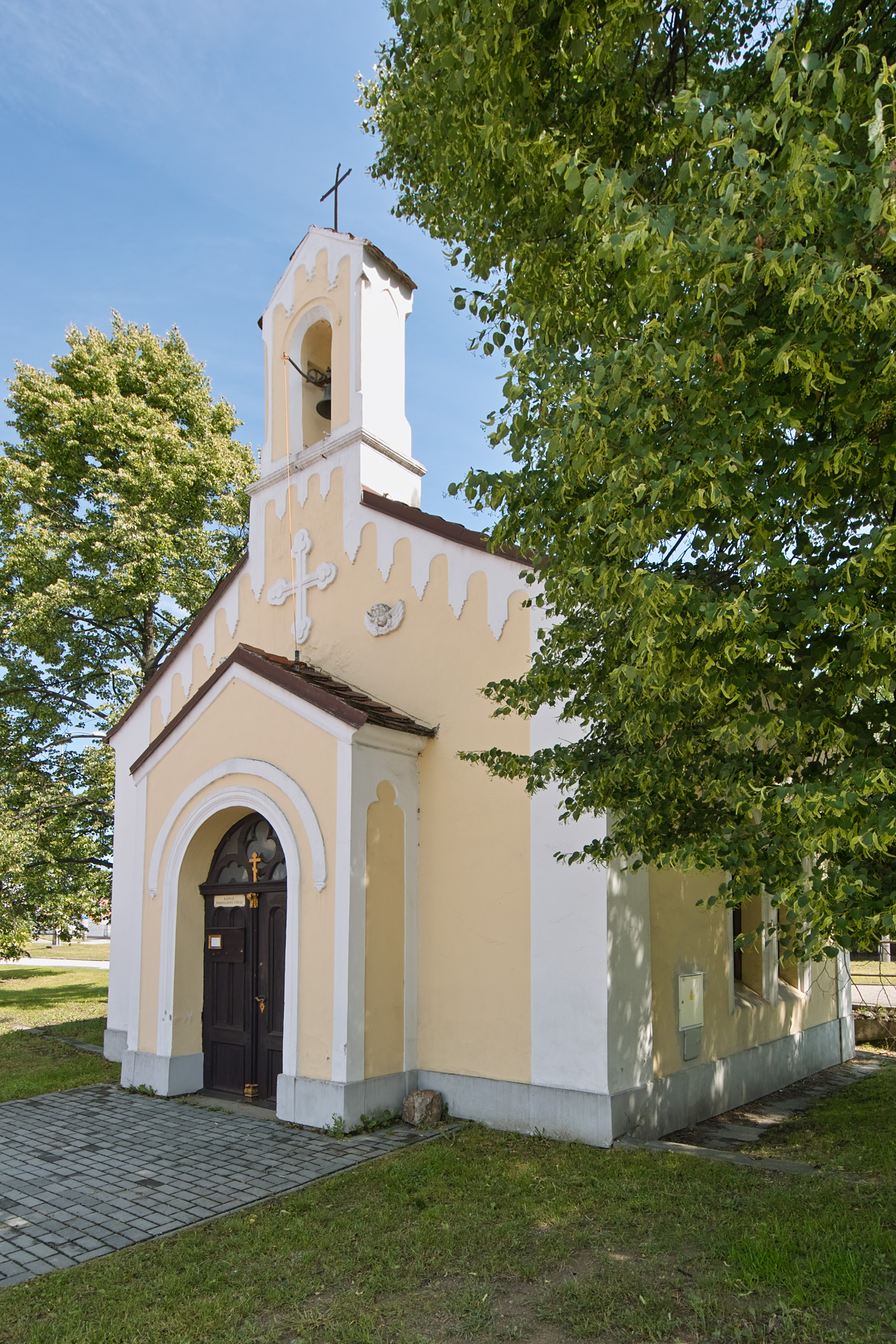 Kaple Všech svatých země české v Českých Budějovicích (portál a zvonička, z jihozápadu)